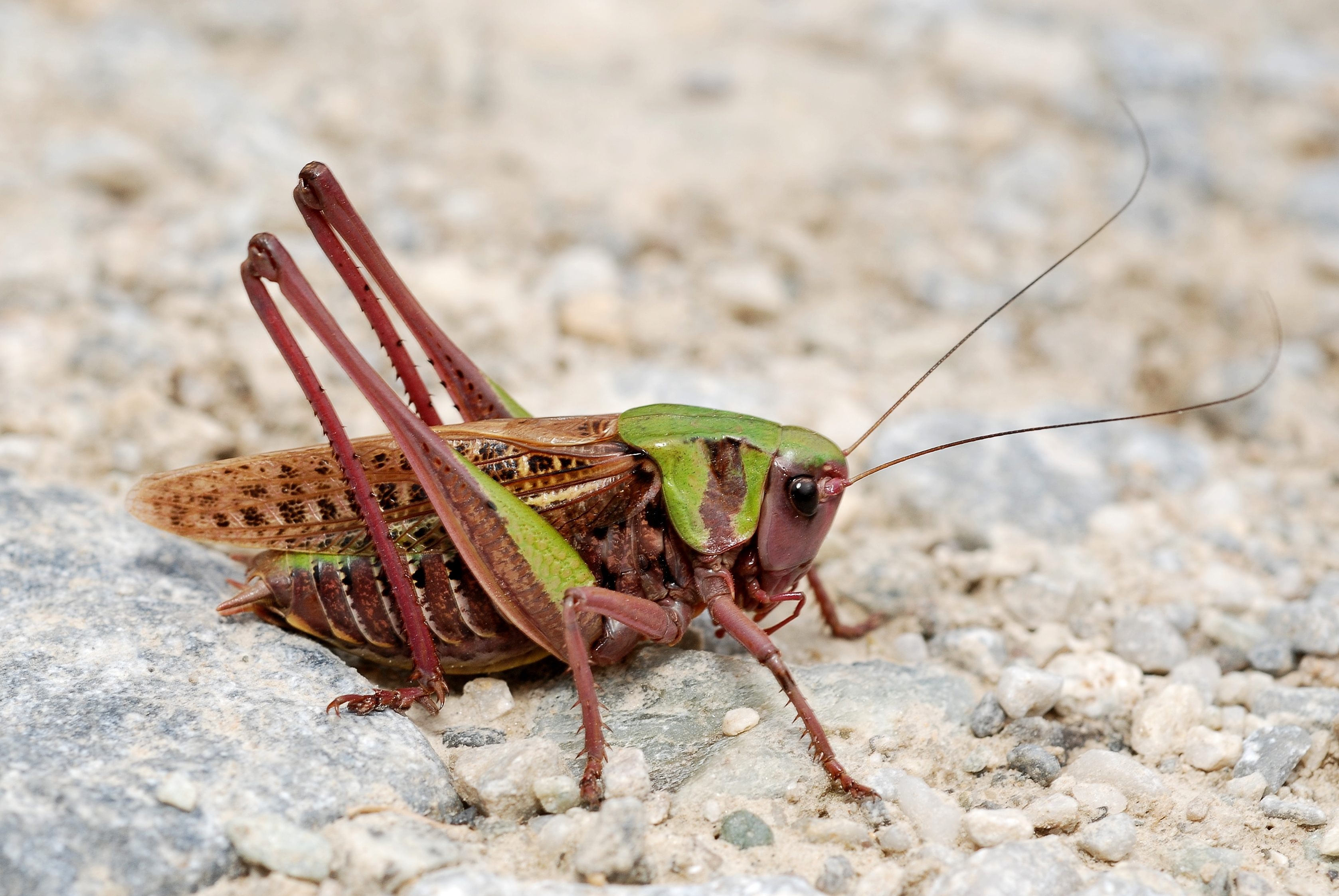 Decticus verrucivorus male